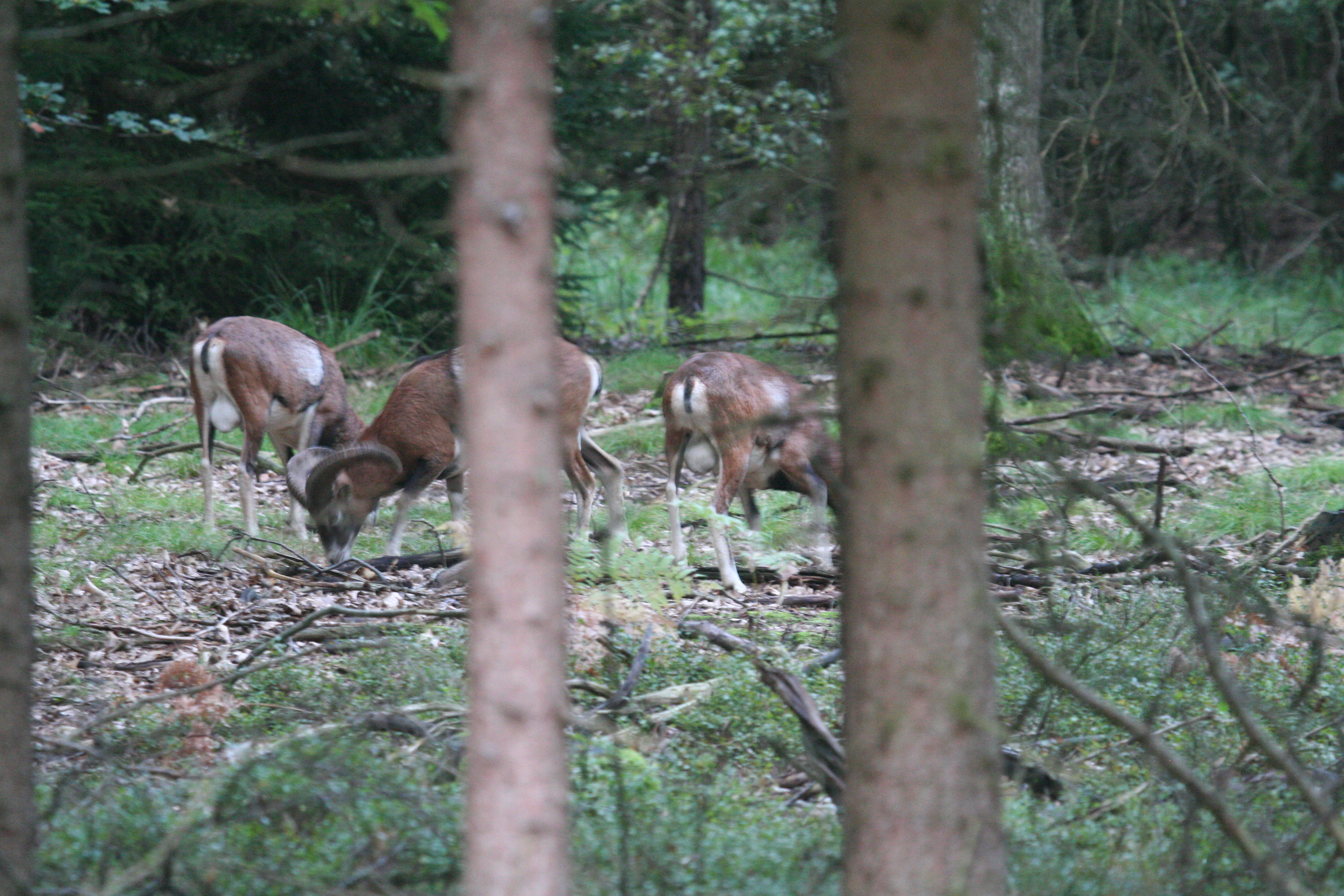 Muffelwild in der Göhrde, Niedersachsen